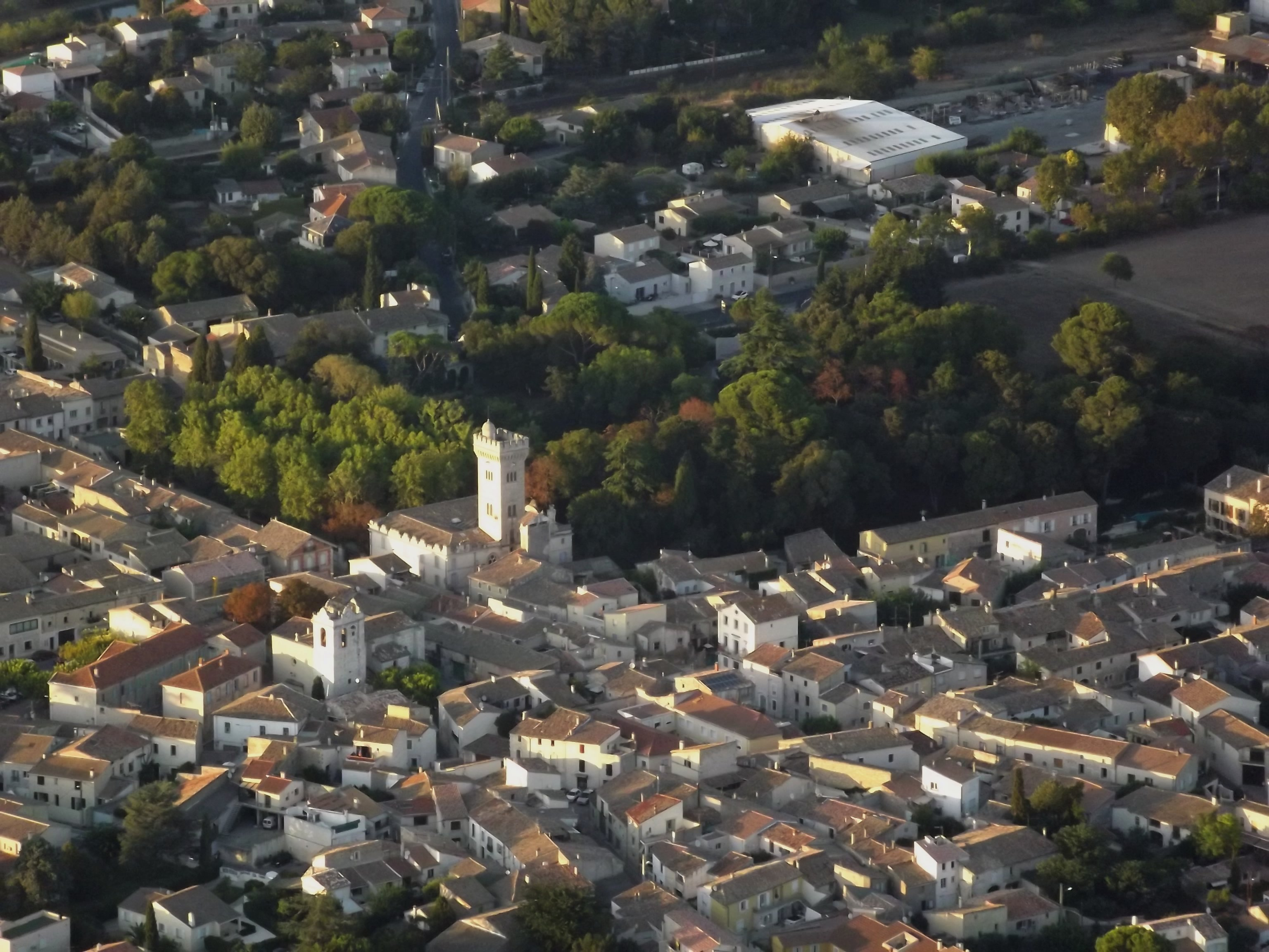 Vue Aérienne de Lunel-Viel (Hérault)